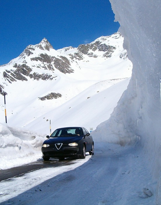 Splügenpass in de vroege lente